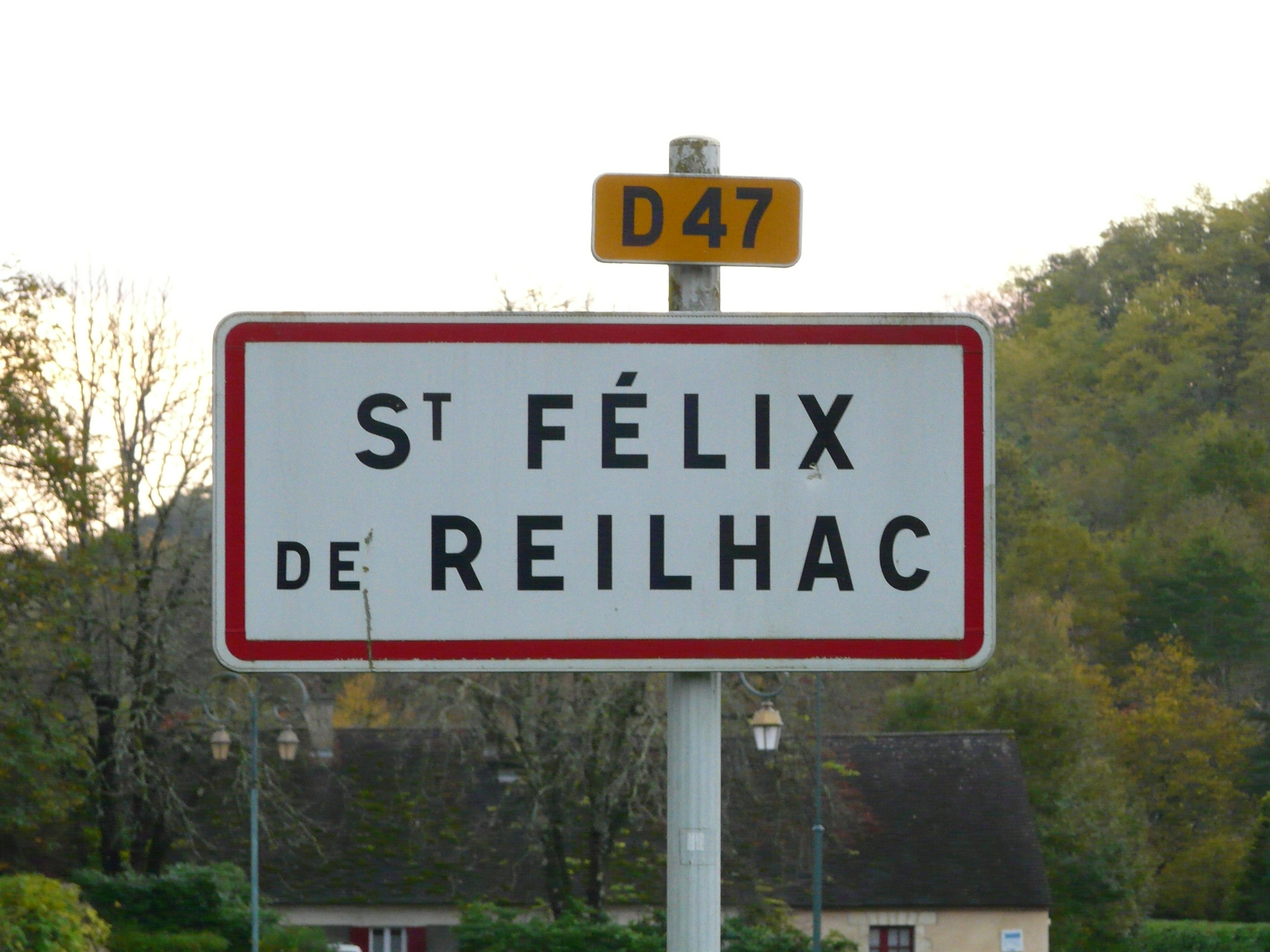 Panneau d'entrée dans le village de Saint-Félix-de-Reillac, Saint-Félix-de-Reillac-et-Mortemart, Dordogne, France.